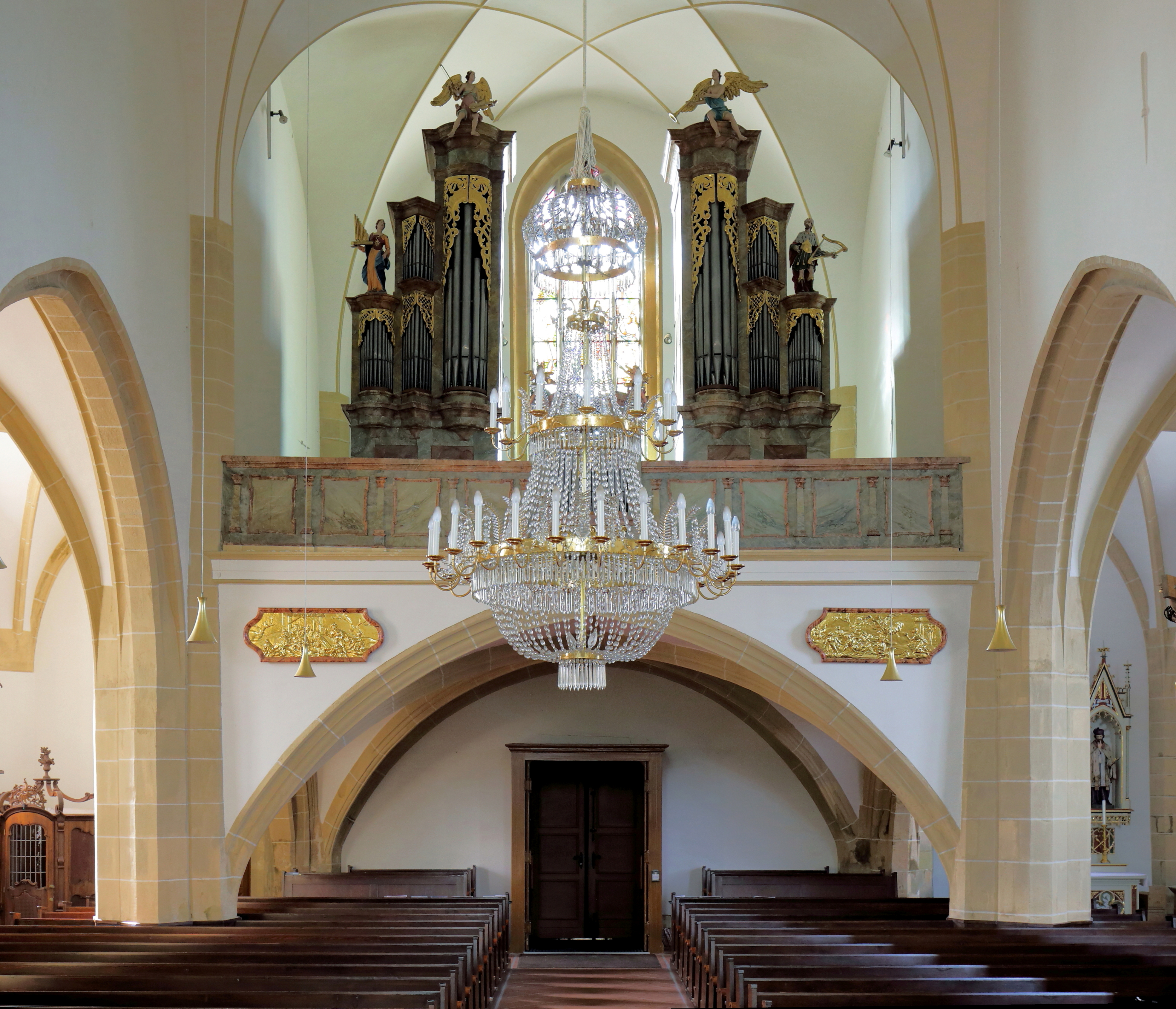 Blick Richtung Orgelempore in der röm.-kath. Pfarrkirche hl. Valentin der niederösterreichischen Marktgemeinde Großrußbach.Das Orgelgehäuse von Johann Hencke (1743) ist ein zweiteilig gestaffeltes Prospekt mit den Aufsatzfiguren Cäcilia und David und hat ein gleichzeitiges Brüstungspositiv. Das Orgelwerk ist von Philipp Eppel (1961).